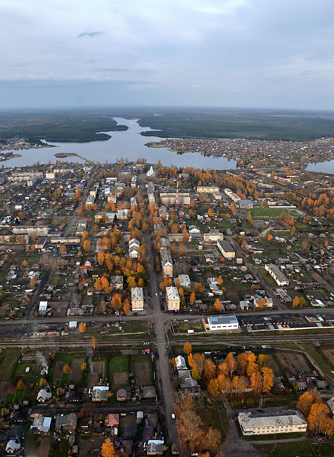 Кирс с высоты птичьего полёта